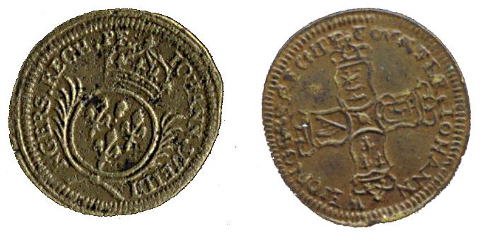 2 Rechenpfennige